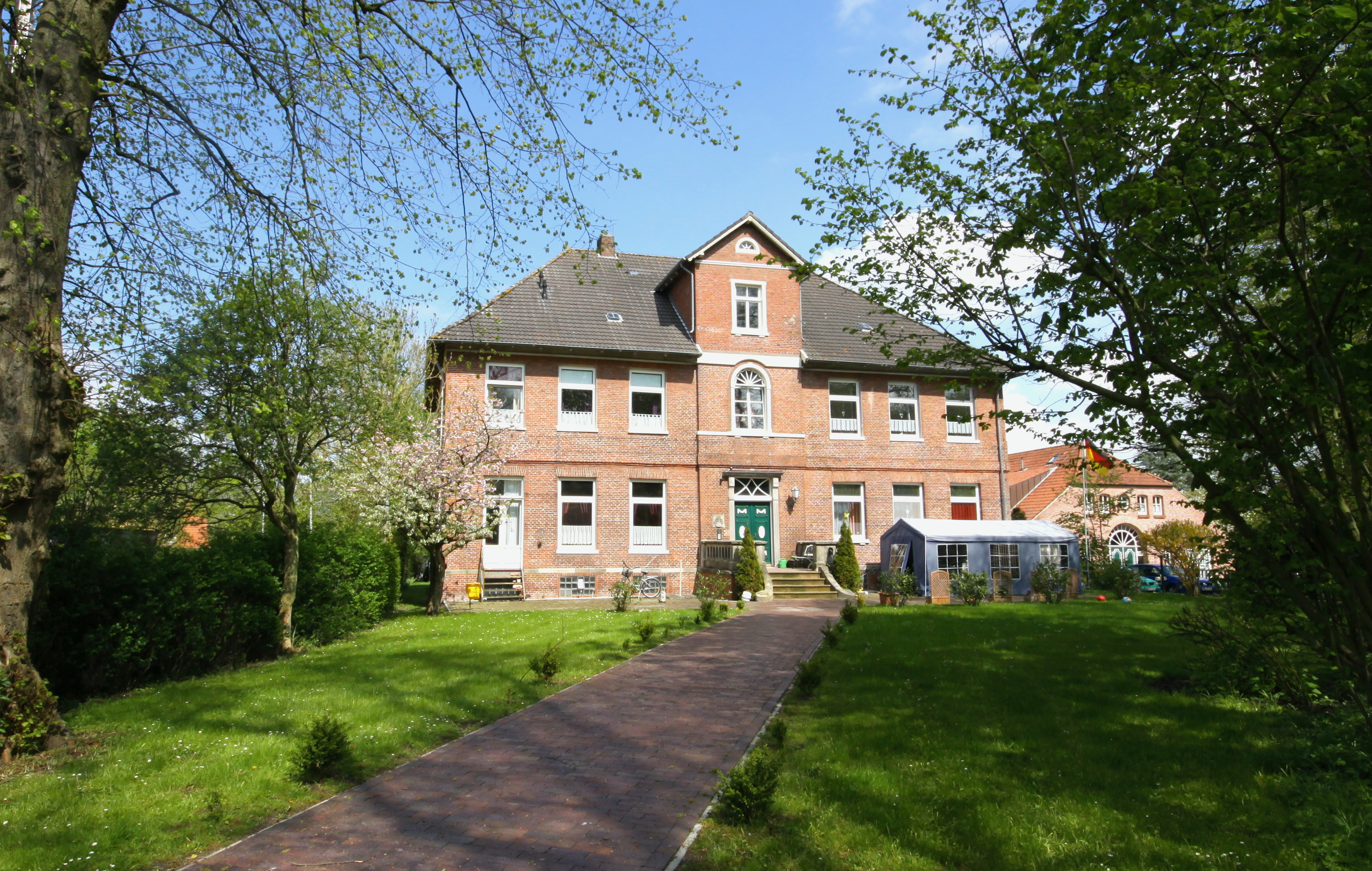 Manningaburg Pewsum - Geburtshaus von Hermine Heusler-Edenhuizen.